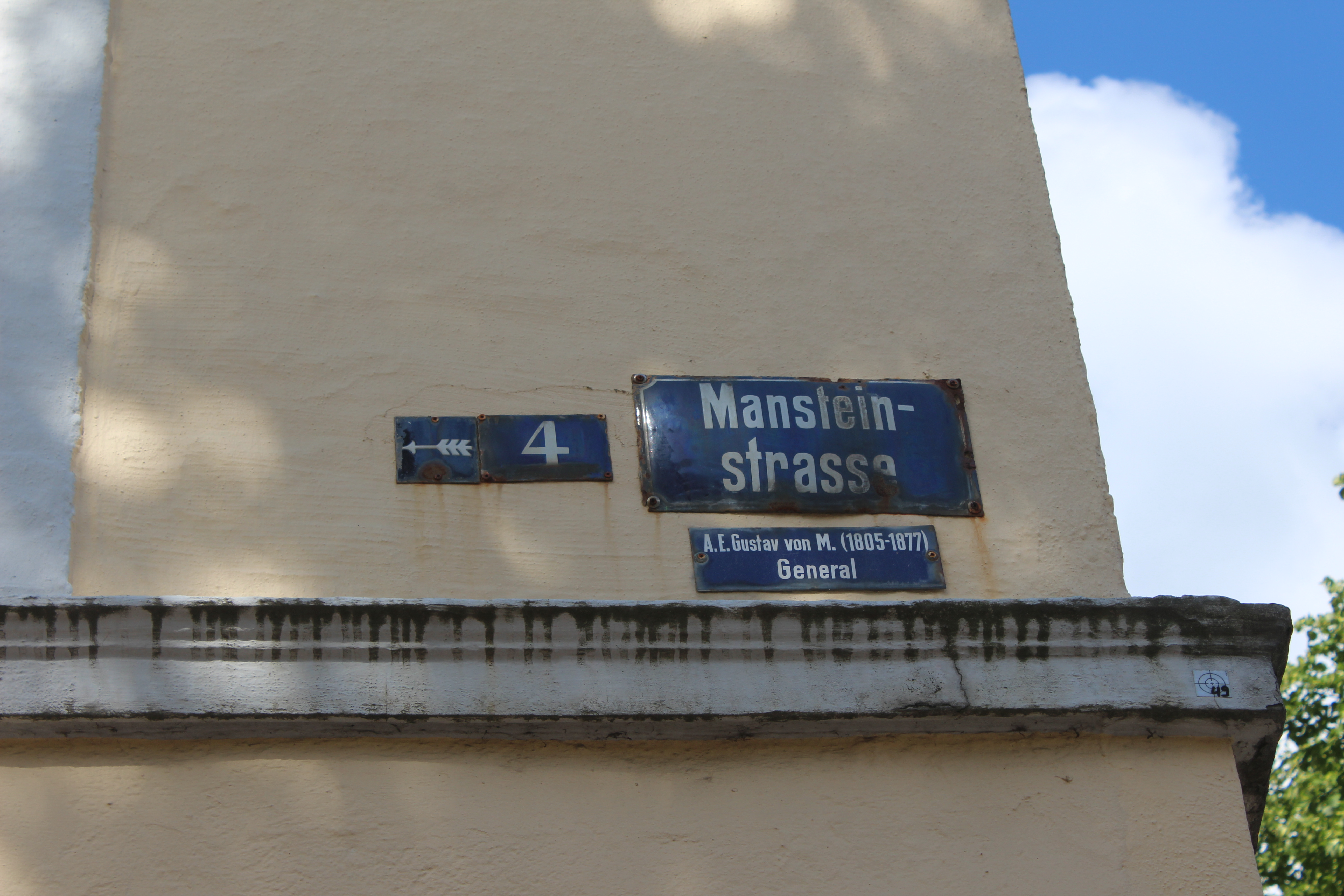 Straßenschild